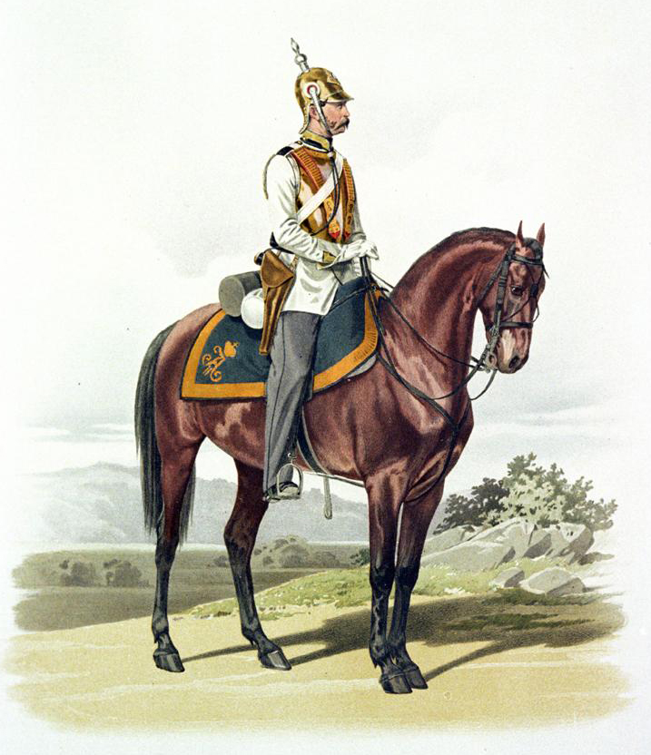 Унтер-Офицер Кирасирского Военного Ордена полка. В парадной форме. 24 Марта 1859.